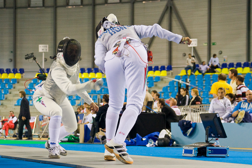 Prise le 5 juillet 2007 aux Championnats d'Europe d'escrime, à Gand (Flandre-Orientale) en Belgique. Aida Mohamed quatrième aux Jeux Olympiques d'Athènes au fleuret individuel femmes